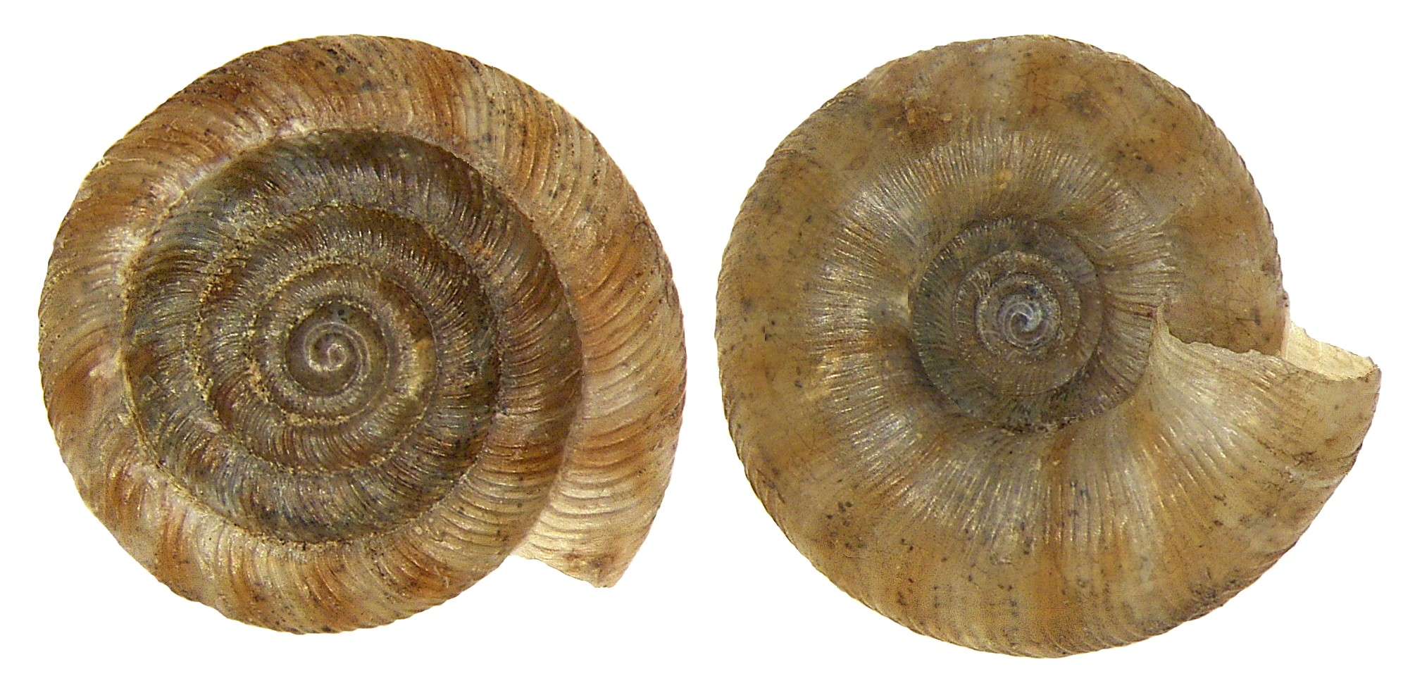 Familie: Endodontidae Groesse: 5,5-7 mm Verbreitung: West- und Mitteleuropa Ökologie: lebt in feuchten, geschützten Standorten unter Bodenstreu und Steinen Fundort: Germania, Bayern, Oberfranken, Weismain leg.det. U.Schmidt, 1985 Photo: U.Schmidt, 2008